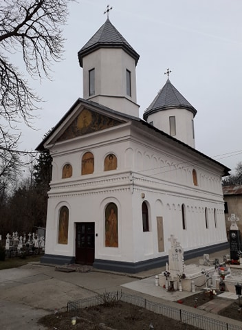 Biserica Adormirea Maicii Domnului, Merișani